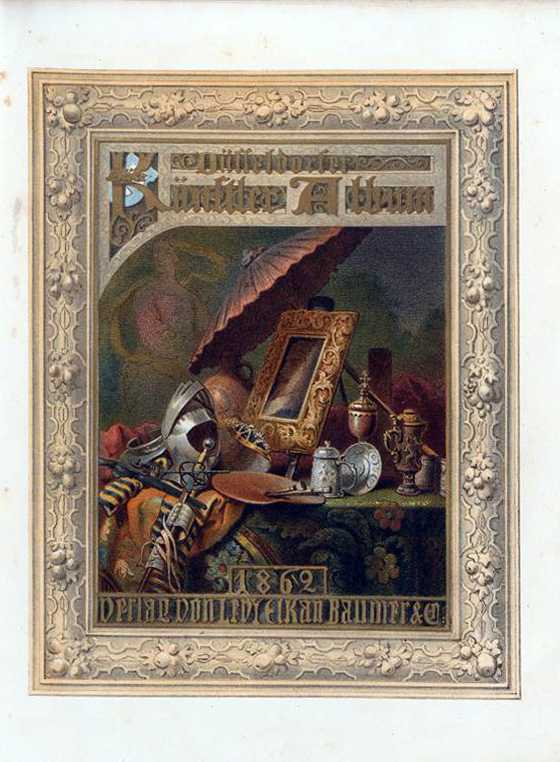 Düsseldorfer Künstler-Album, 12. Jg. 1862, Kupfertitel, Titelblatt gezeichnet von Max Hess (* 15. Oktober 1825 in München; † 19. Juli 1868 in Lippspringe) , Farbendruck, lithographiert von Johann Baptist Sonderland